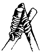 Tripod lashing 3